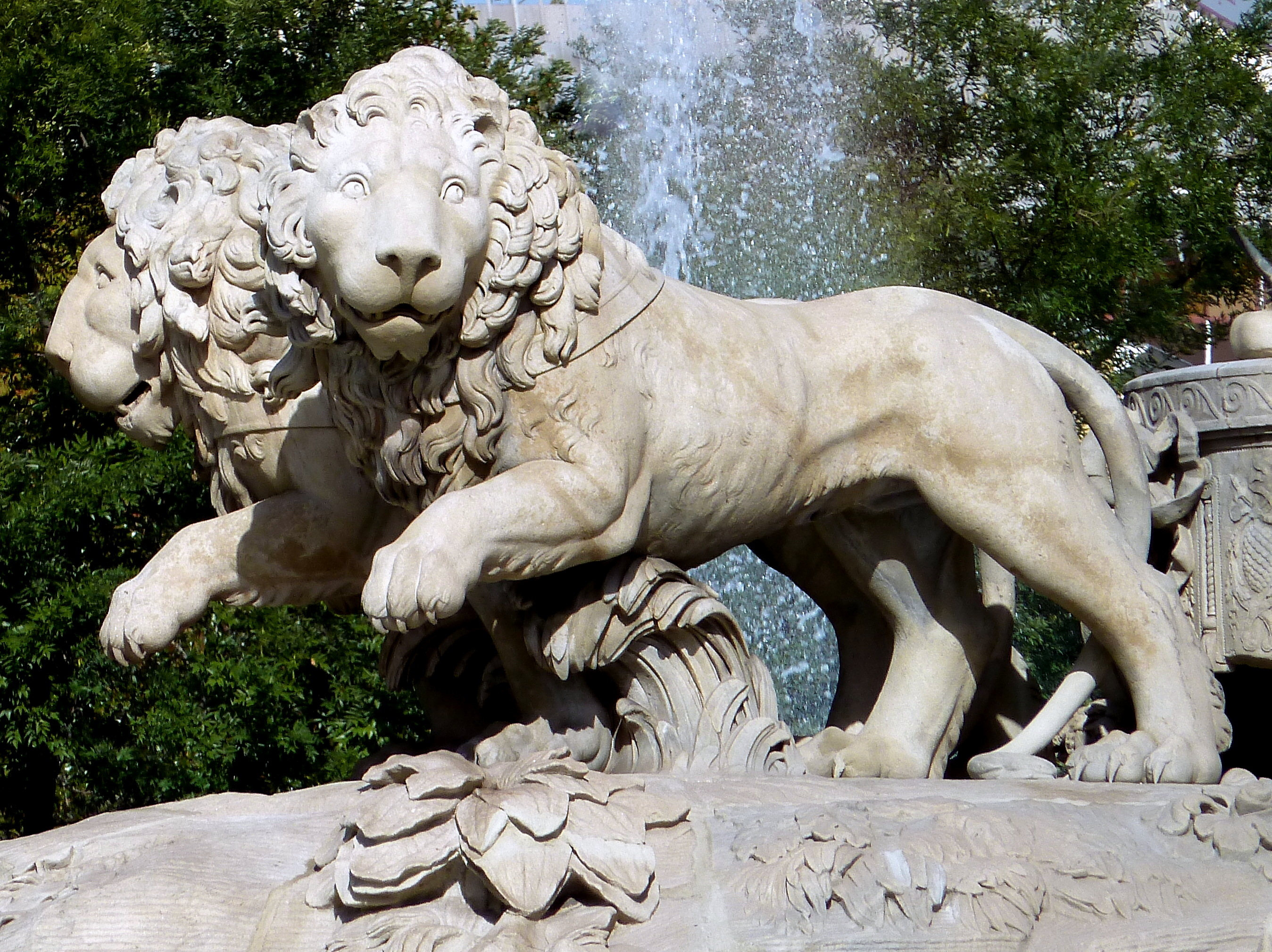 Fuente de Cibeles: los dos leones (Atalanta e Hipómenes) que tiran del caro de la diosa de la Madre Tierra , Cibeles - Plaza de Cibeles, Madrid (España).